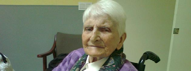 Pilare Alba, 100 urte bete zituen egunean.